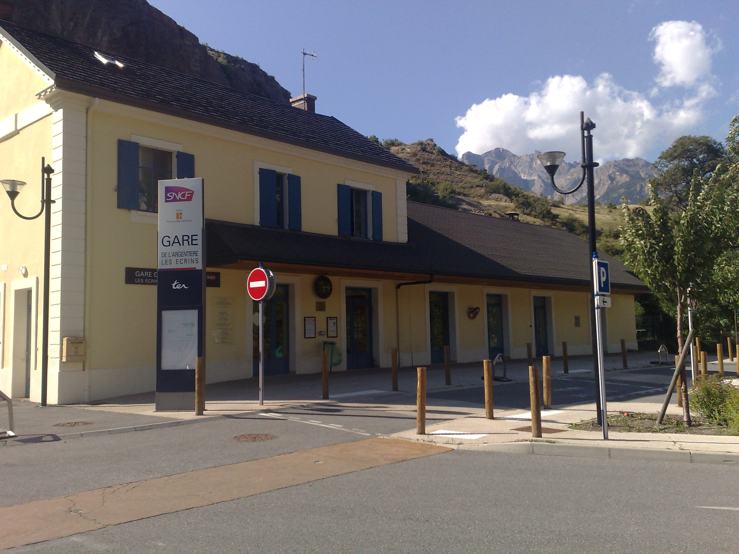 Gare SNCF de L'Argentière Les Ecrins